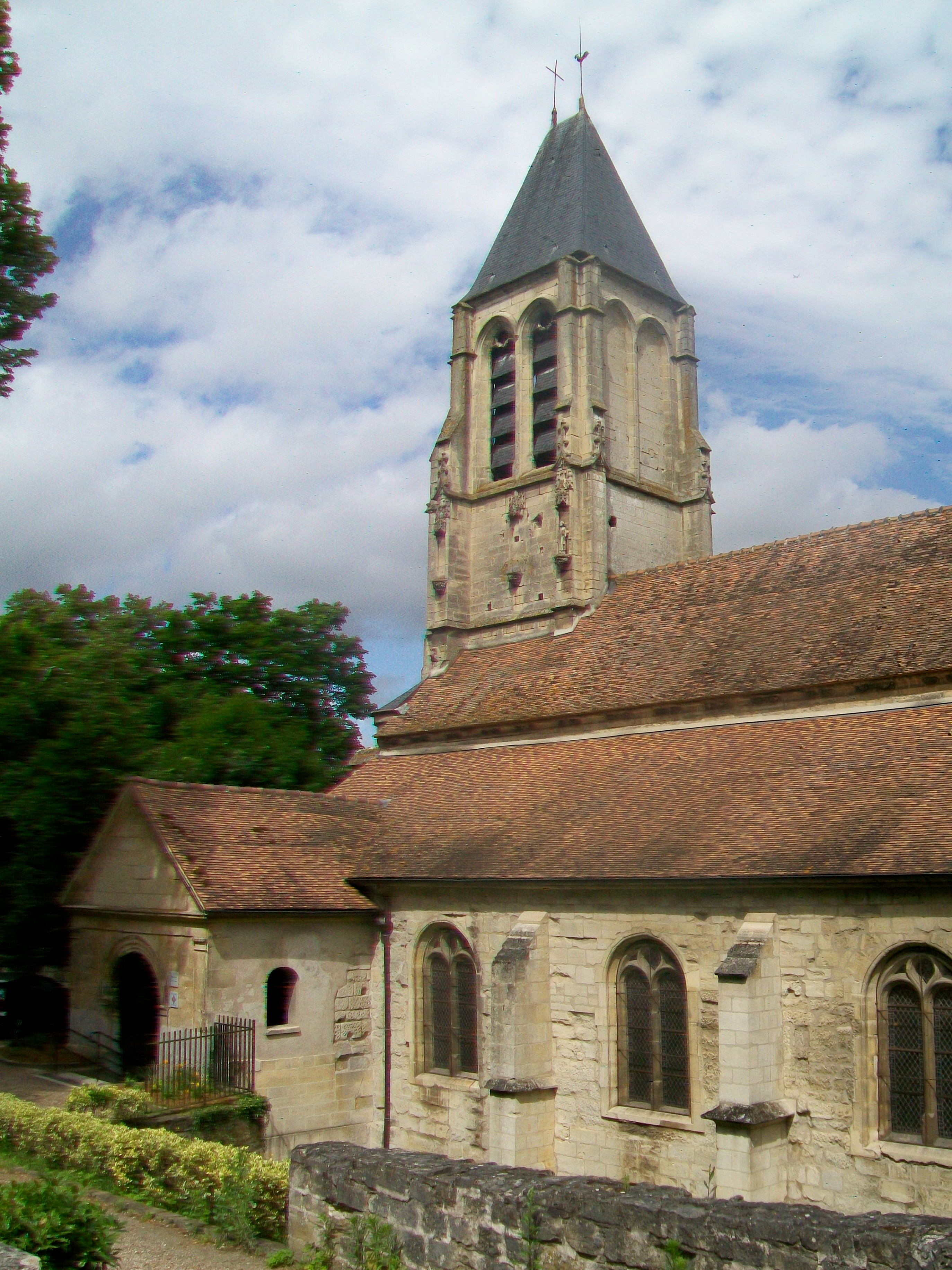 L'église Saint-Denis, façade sud-ouest, rue de l'Isle-Adam. La façade opposée est accolée au château de Méry-sur-Oise, et les deux autres façades donnent également sur le domaine du château.